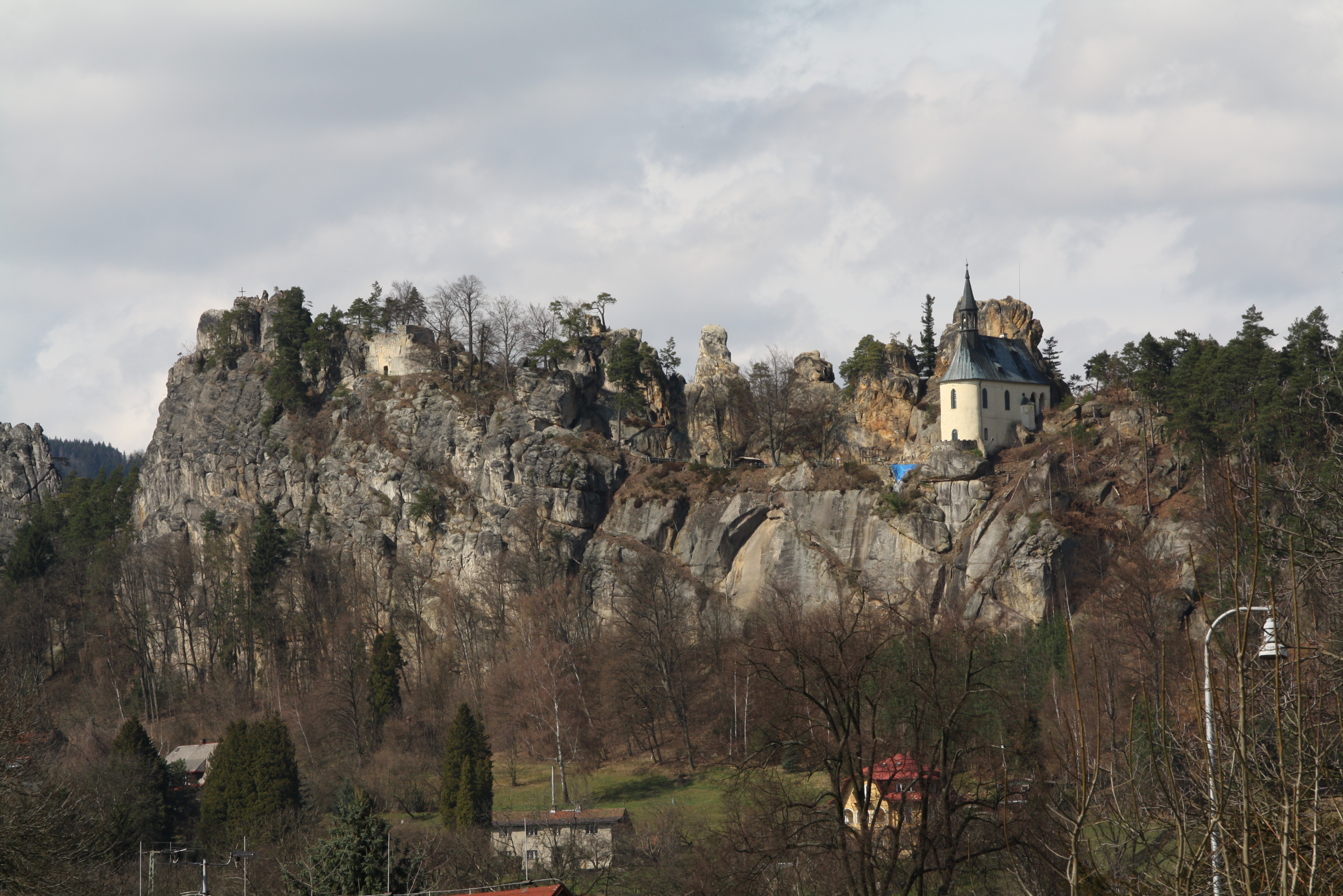 Hrad Vranov, Malá Skála.